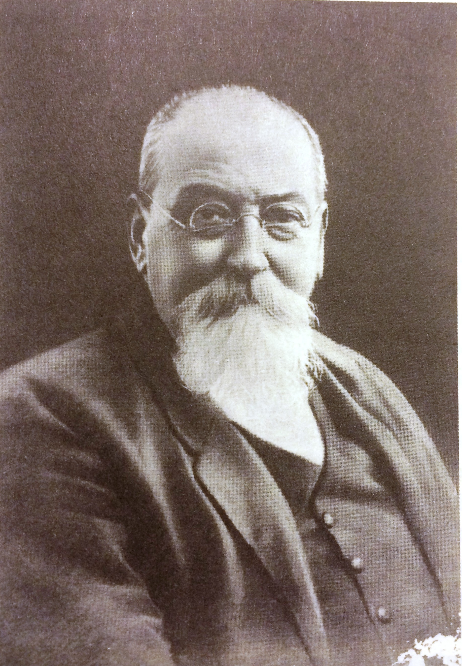 Ritratto